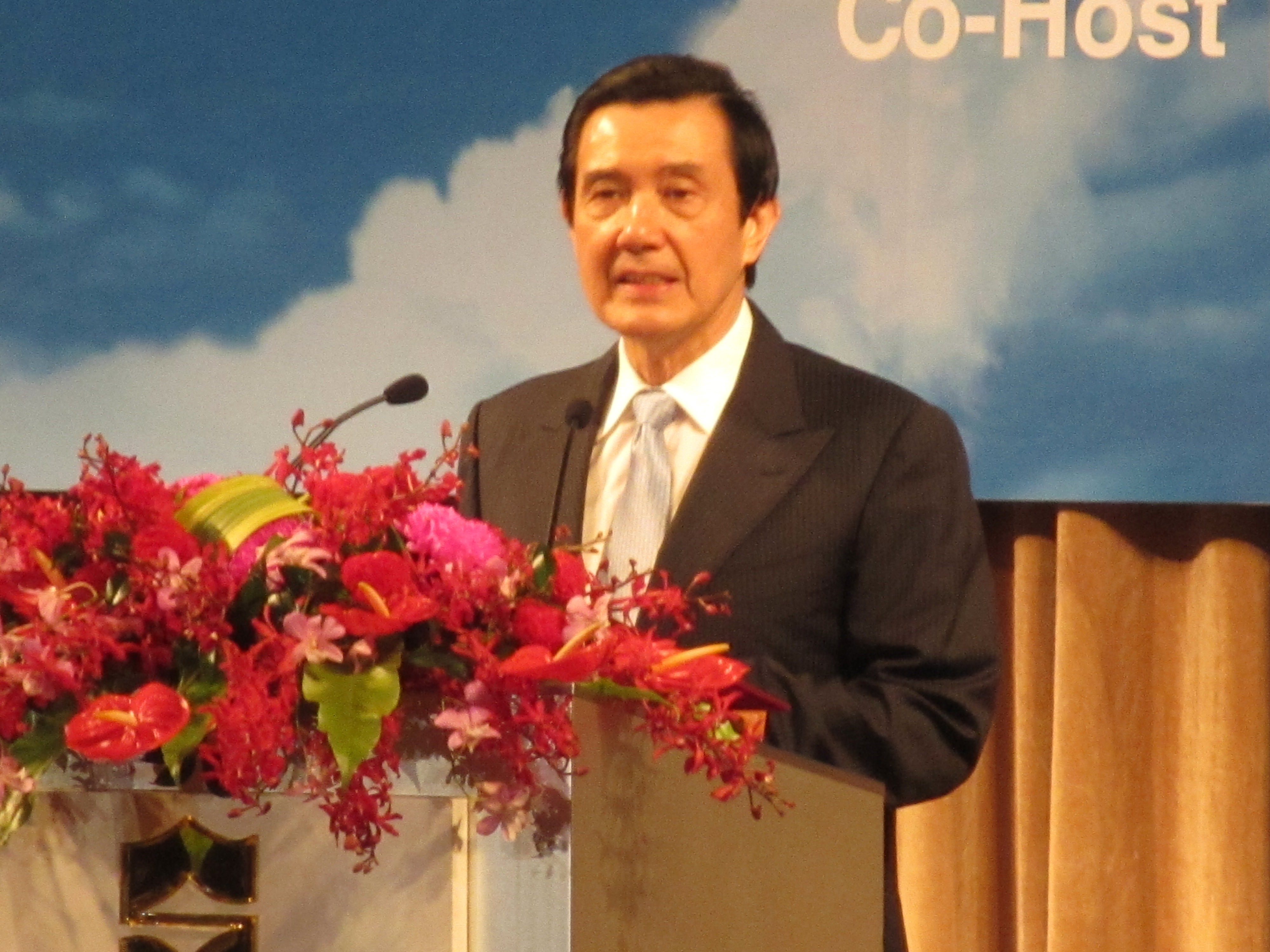 中華民國總統馬英九。